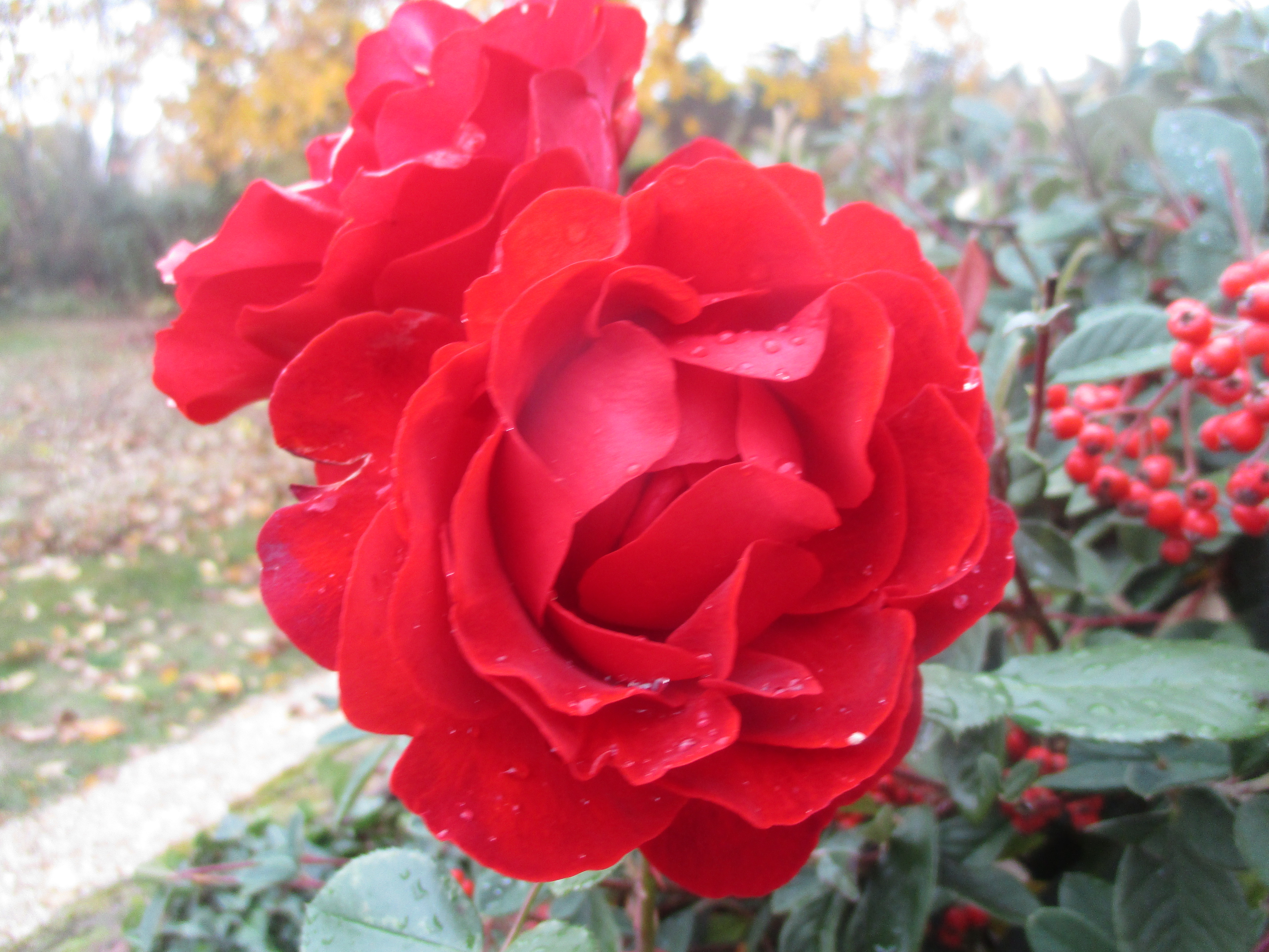 Rose 'Fluorescent' (Delbard, 1977) en novembre en France.